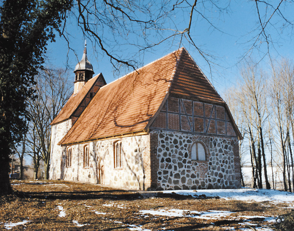 Dorfkirche von Groß-Poserin, Landkreis Ludwigslust-Parchim, Mecklenburg-Vorpommern